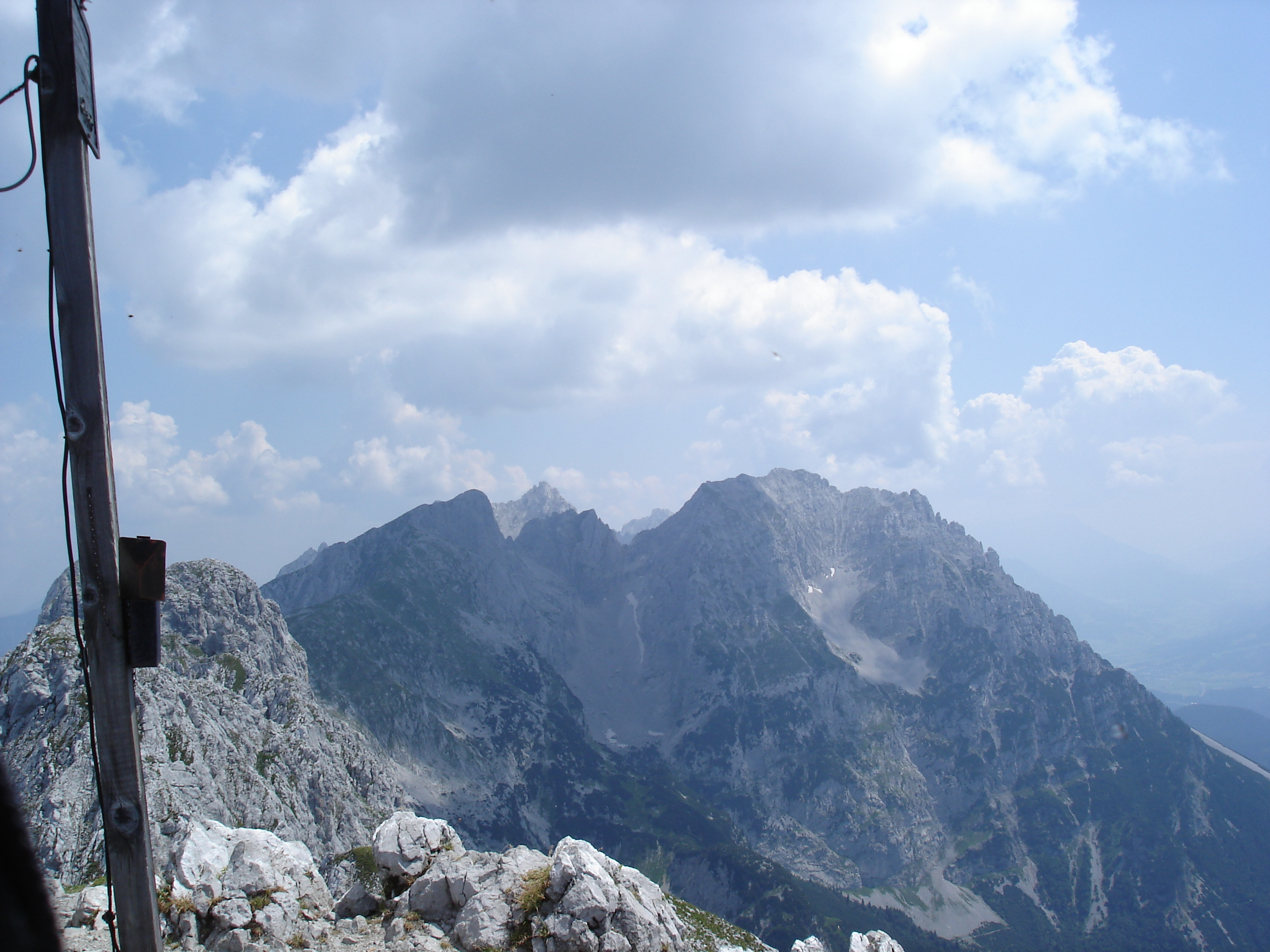 Treffauer und Tuxegg, Kaisergebirge